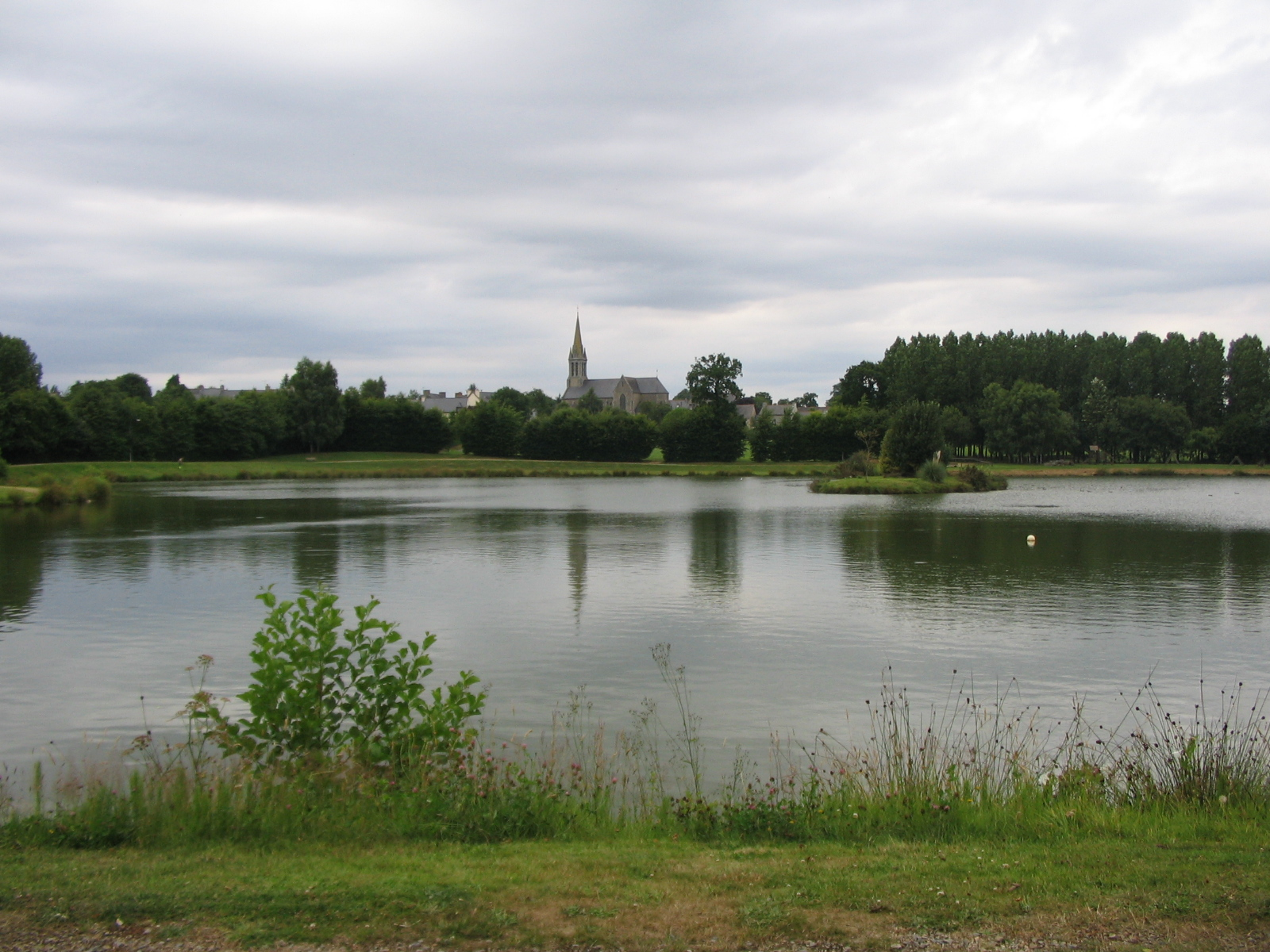 Plan d'eau de Langourla, Côtes d'Armor, France.